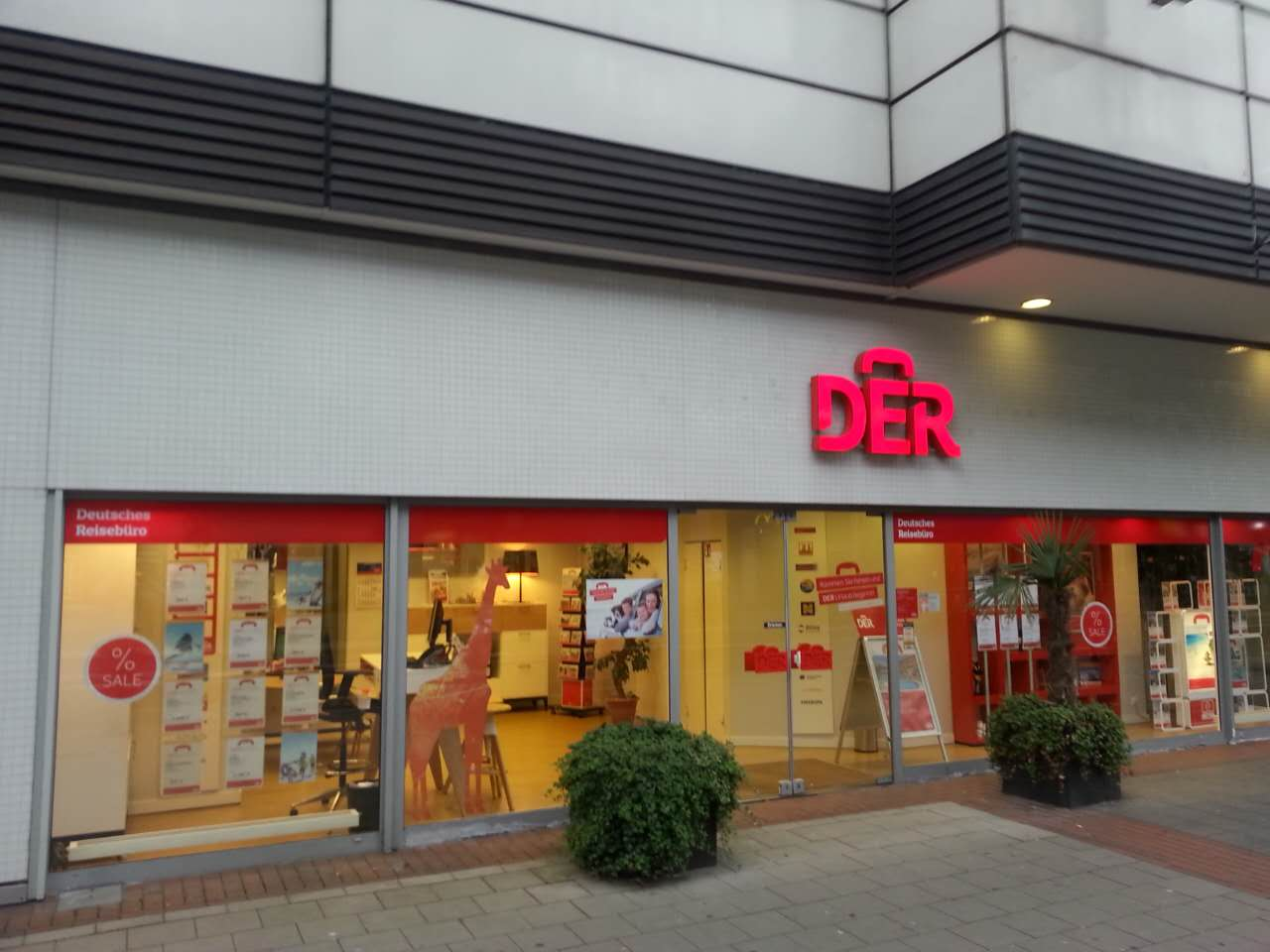 DER Reisebüro Düsseldorf